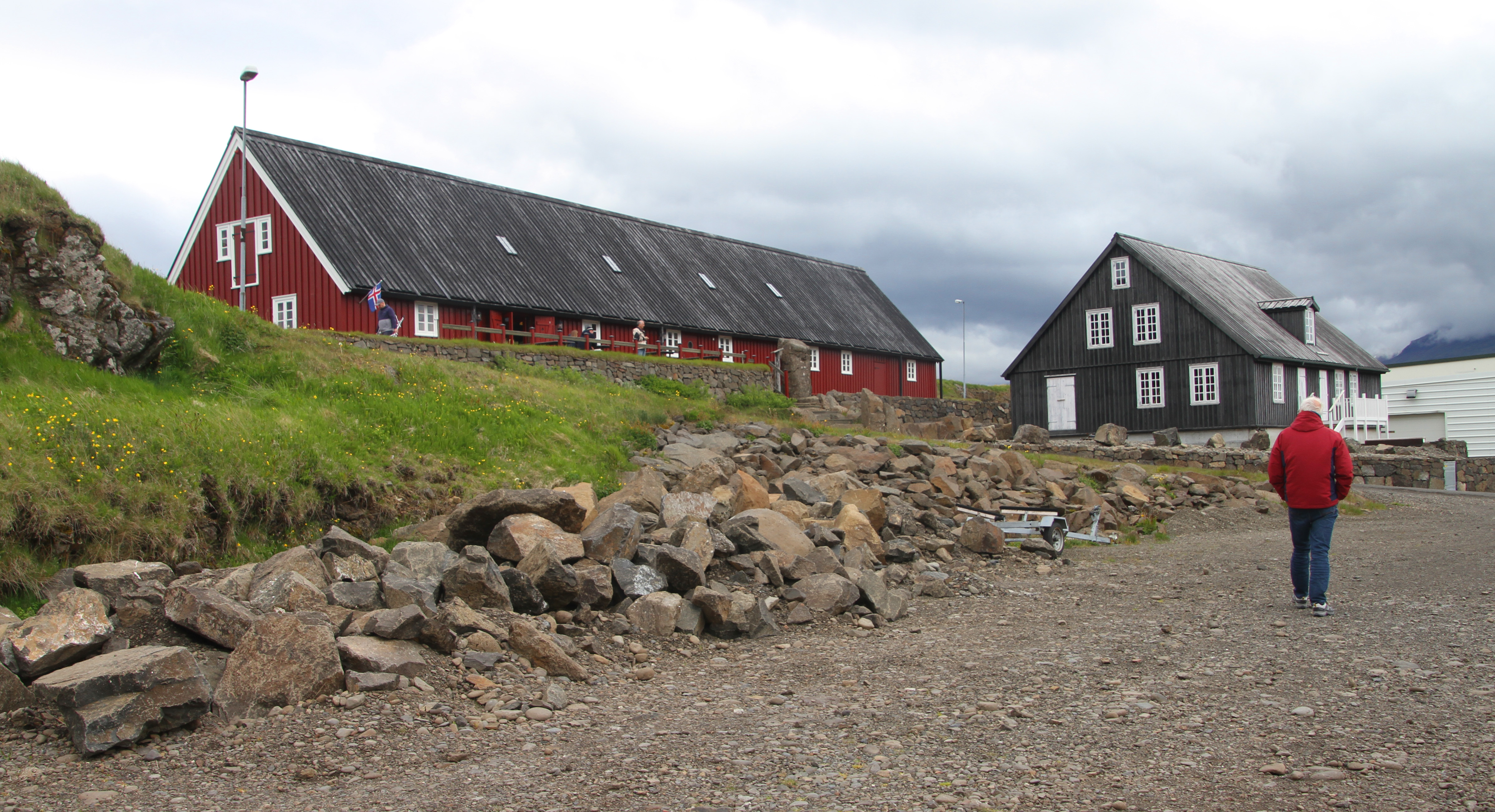 Djúpivogur in Island